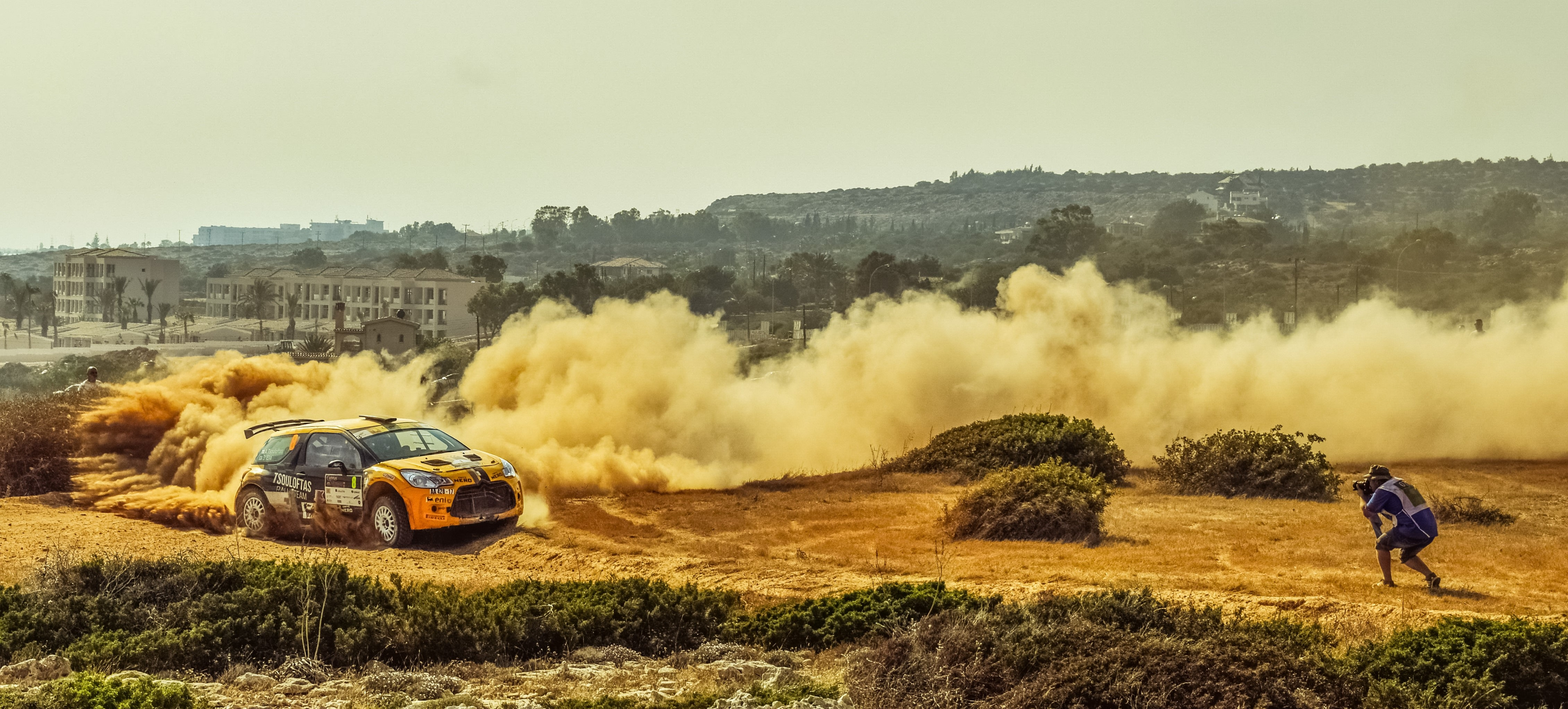 Alexandros Tsouloftas podczas Rajdu Cypru 2017 jadący Citroenem D3S R5